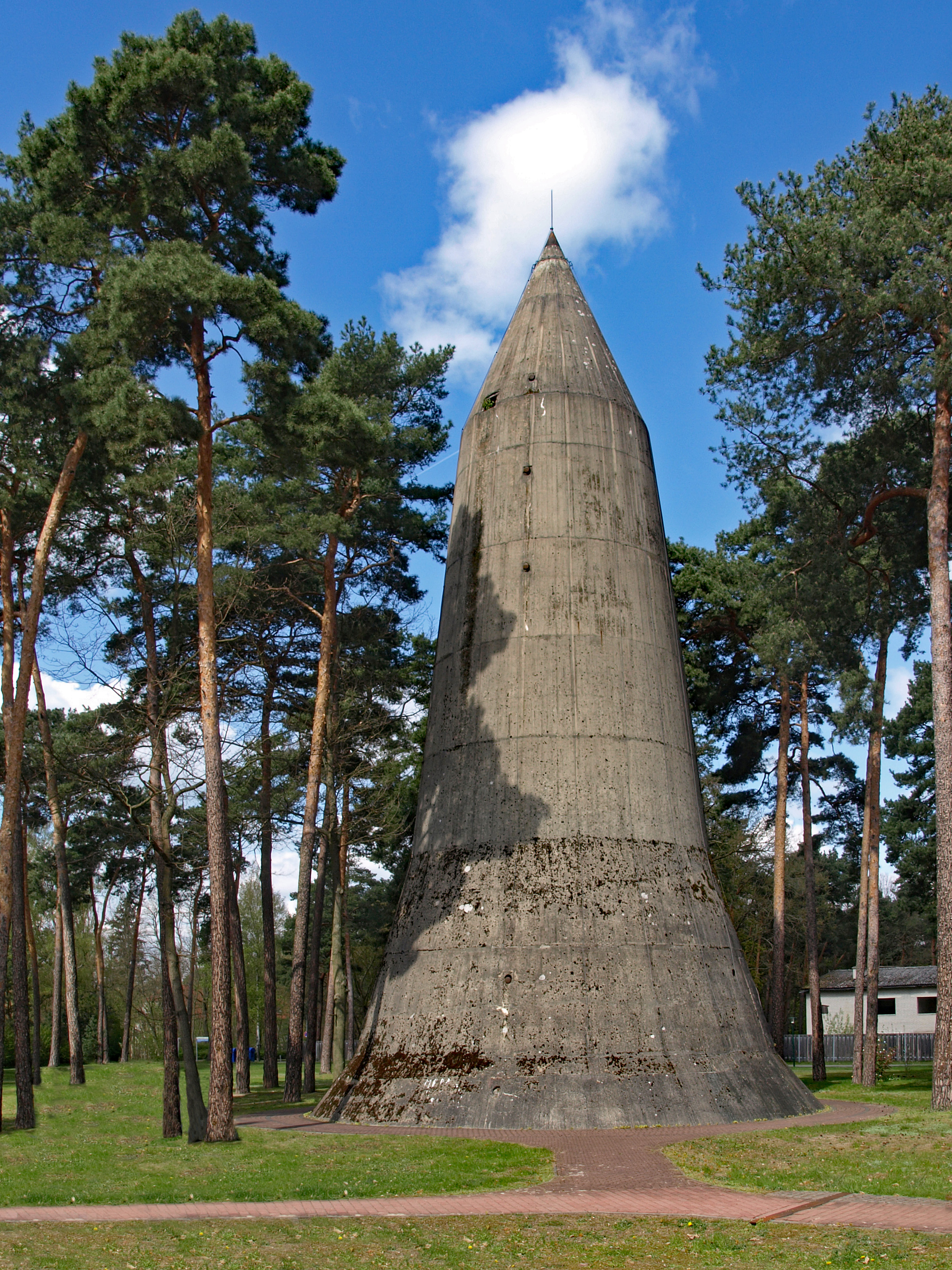 Hochbunker der Bauart Winkel in Wünsdorf